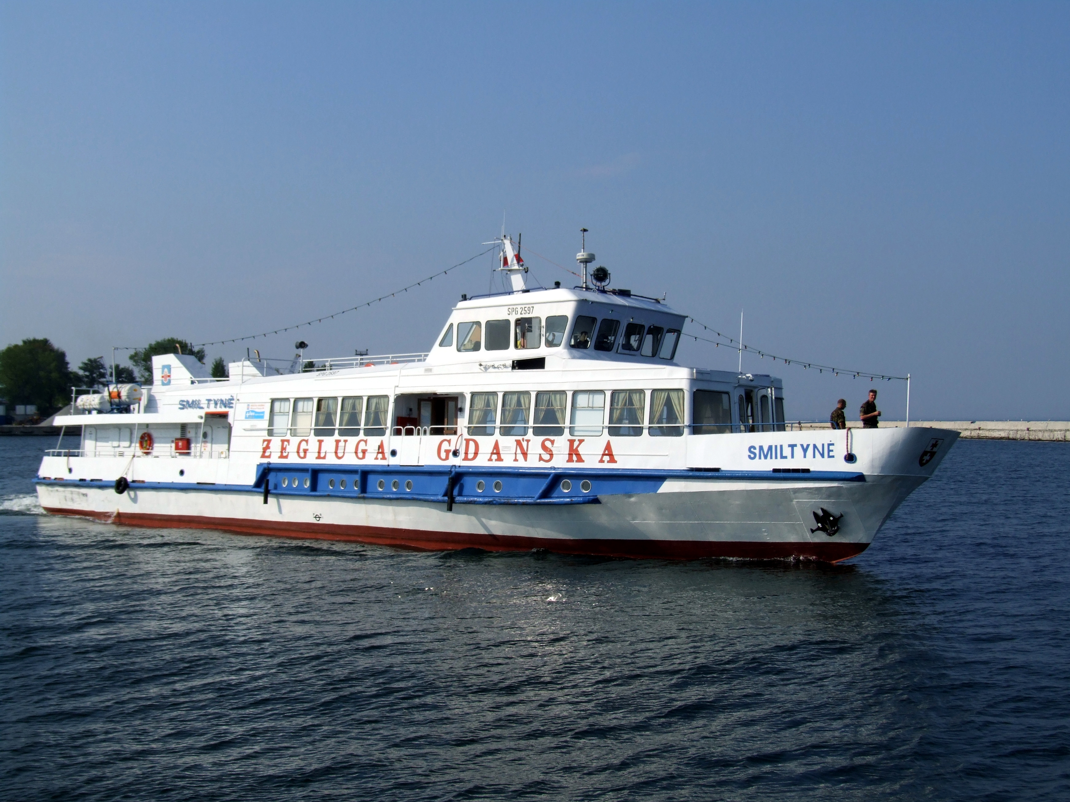 MS Smiltyne